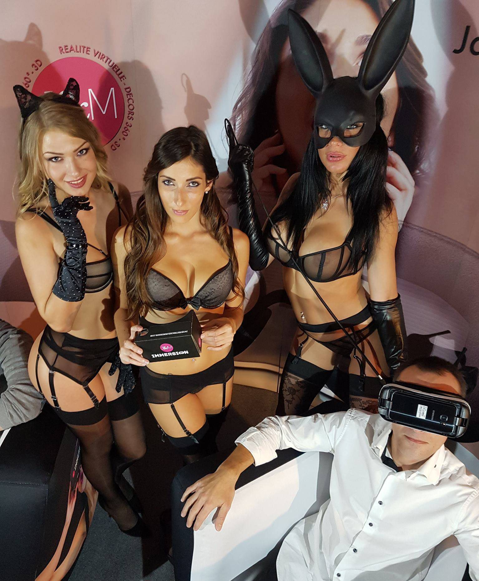 J'ai pris cette photo au salon de l'Erotisme de Rouen, le 4 novembre 2016, sur le stand Jacquie et Michel Immersion.